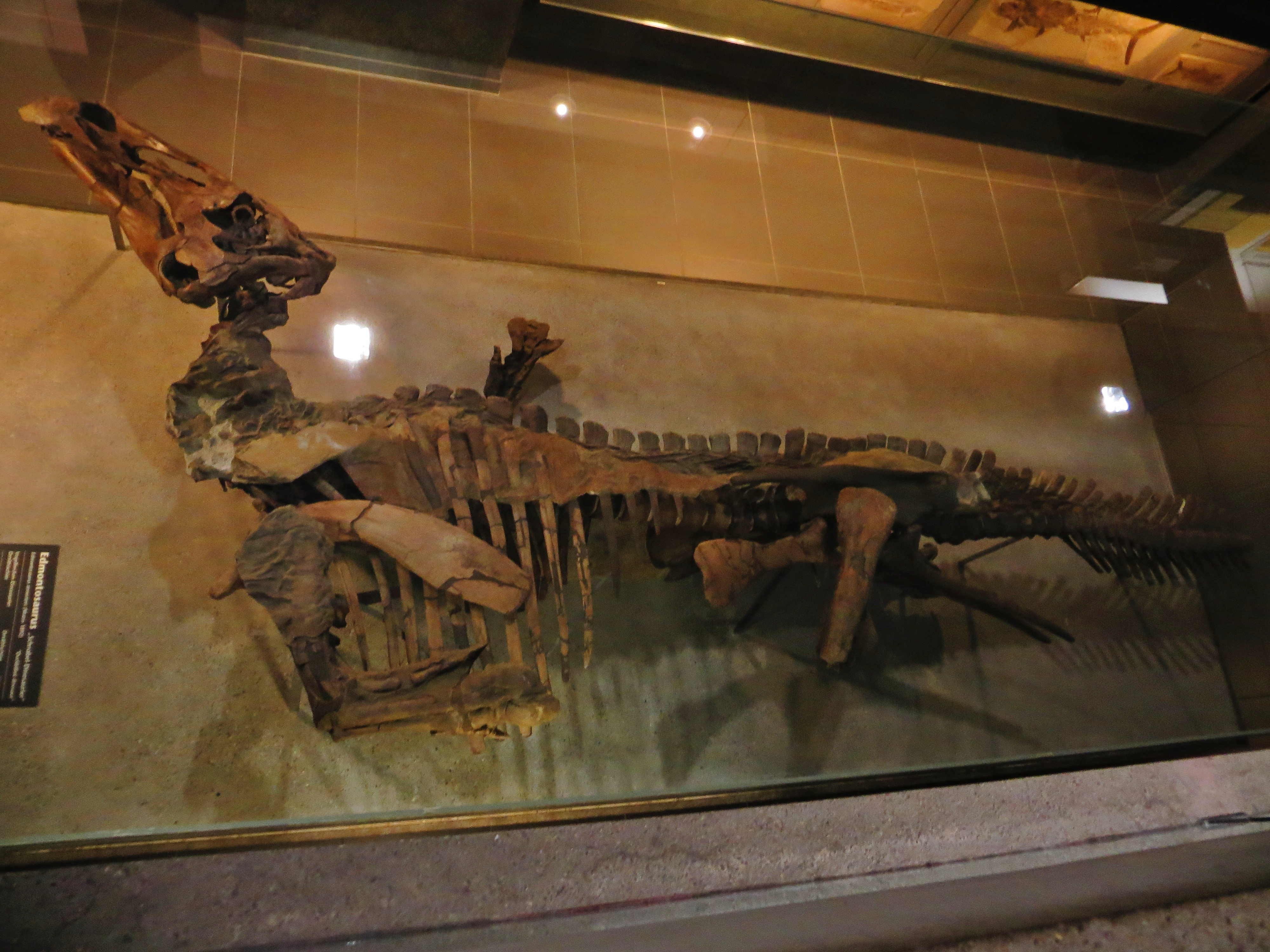 Took the picture at Senckenberg Museum, Frankfurt